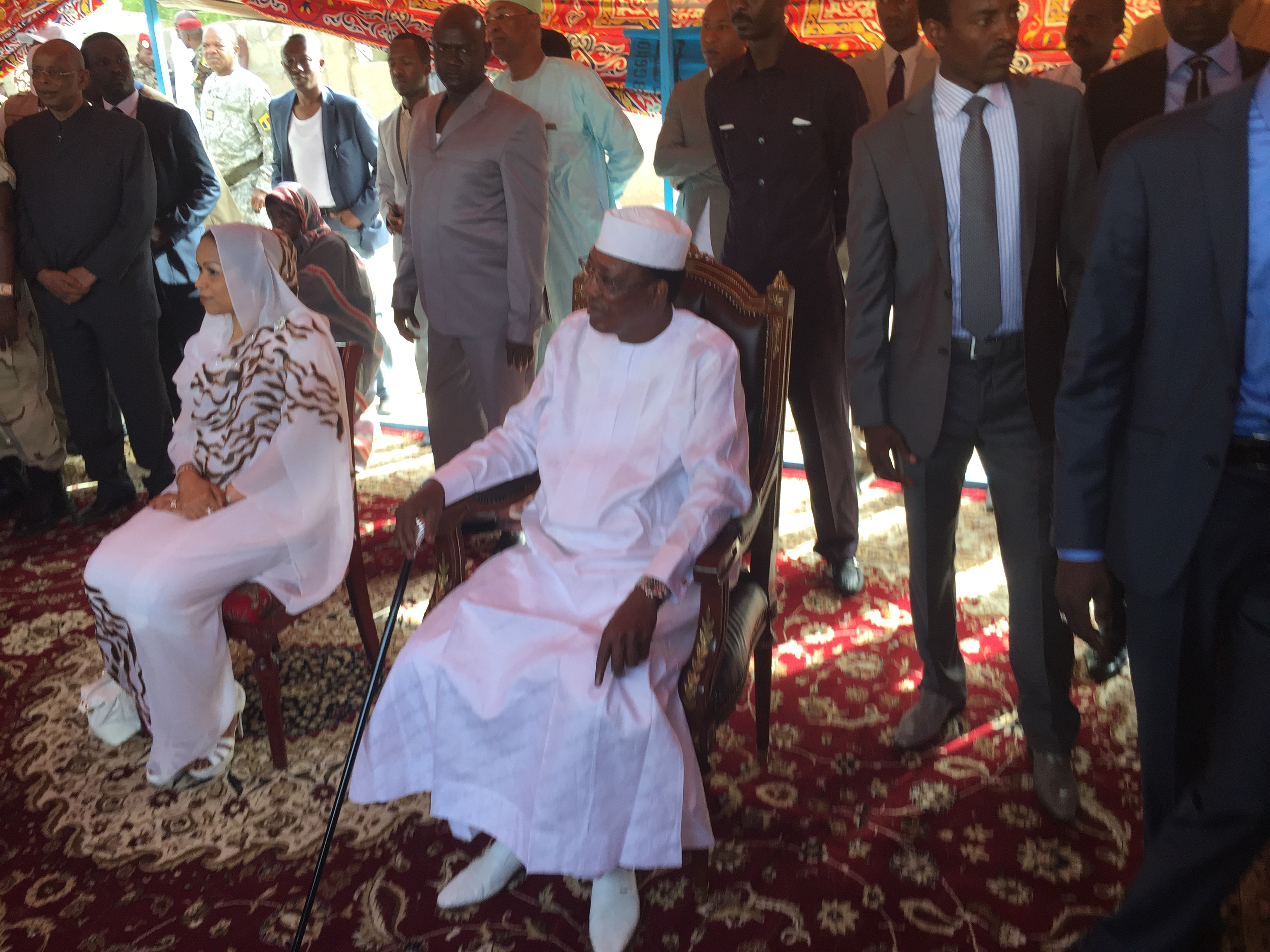 Le président sortant, Idriss Deby, Itno et son épouse sont assis dans leur centre de vote, en attendant d’accomplir leur devoir de citoyens, N’Djamena, Tchad, 10 avril 2016